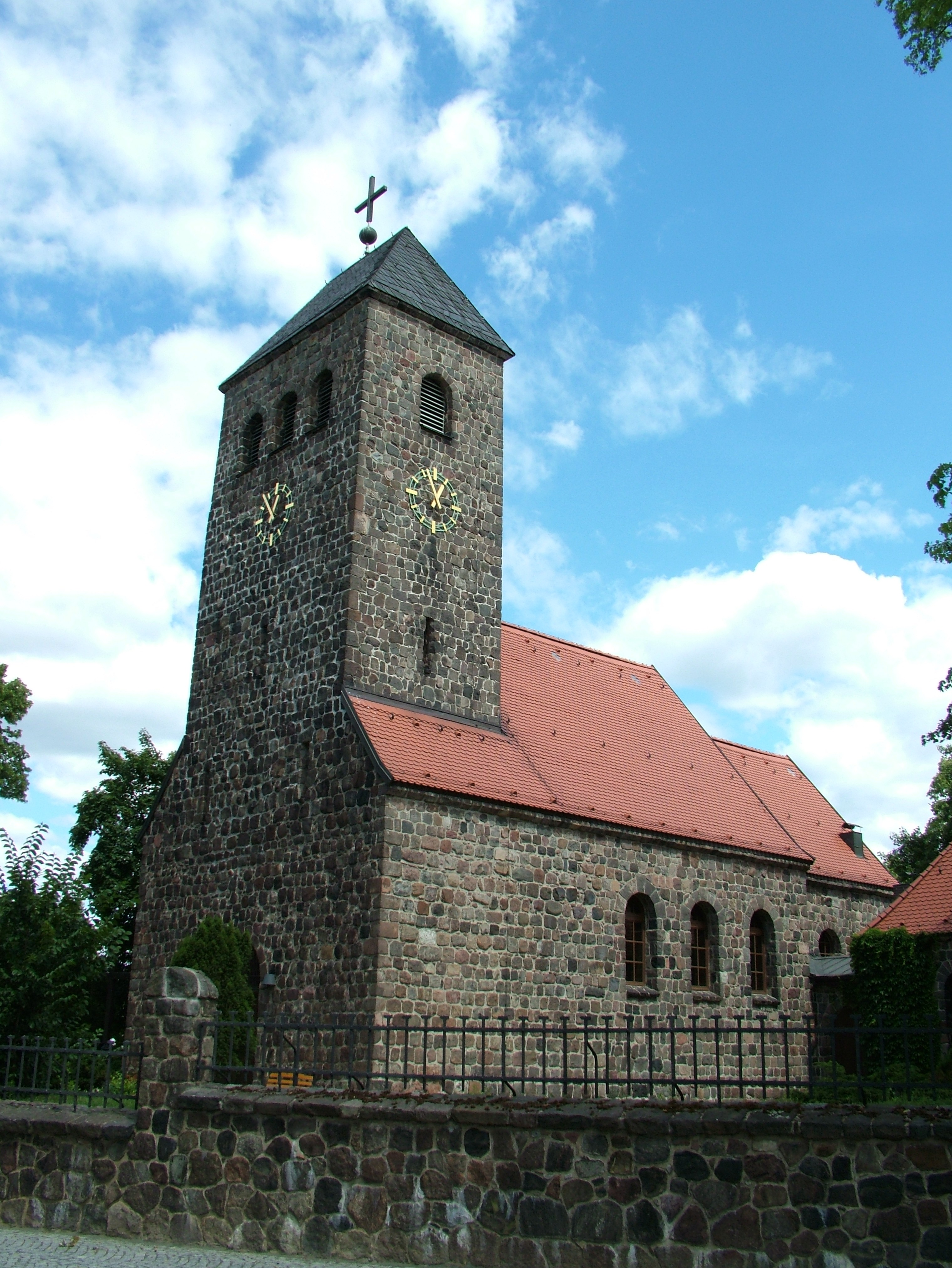 Schönefeld bei Berlin, Brandenburg, die Kirche